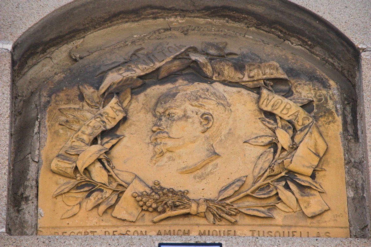 Làpida de Rossend Nobas i Ballbé (Barcelona, 1838-1891), escultor català.